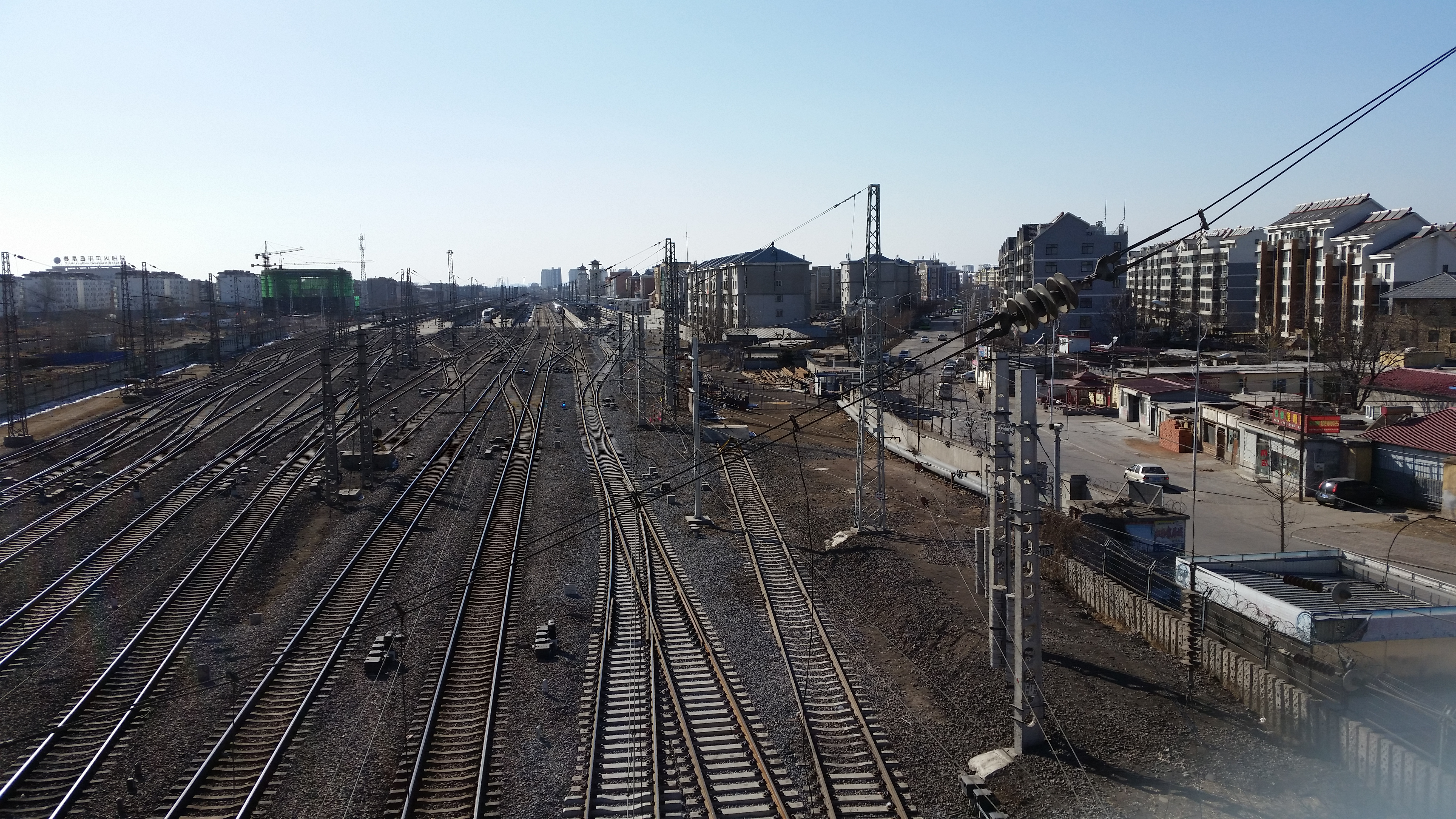 中文（中国大陆）: 山海关站东咽喉